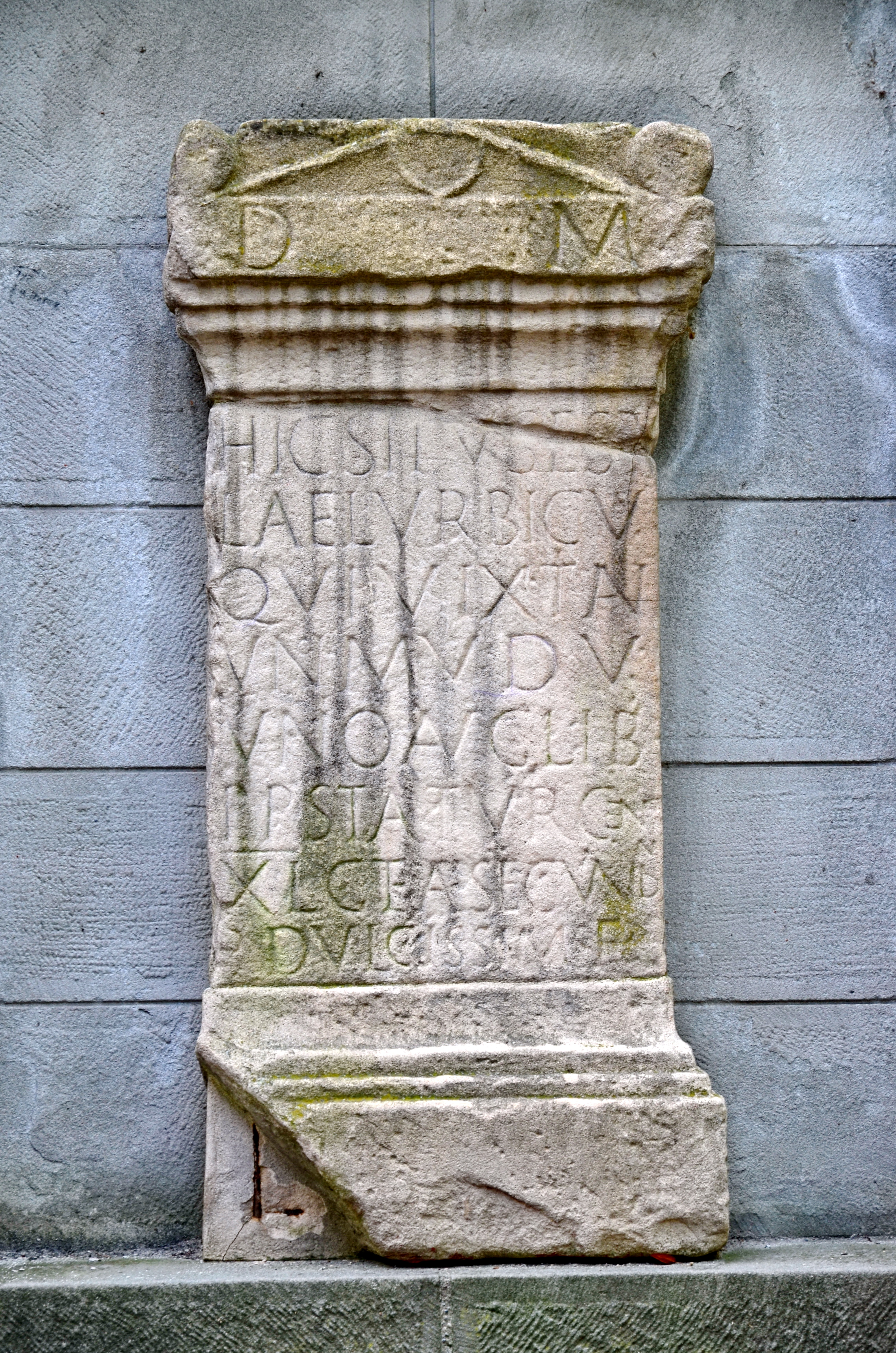 Altstadt (keltische/ römische Siedlung, mittelalterliche Stadt, Pfalz)